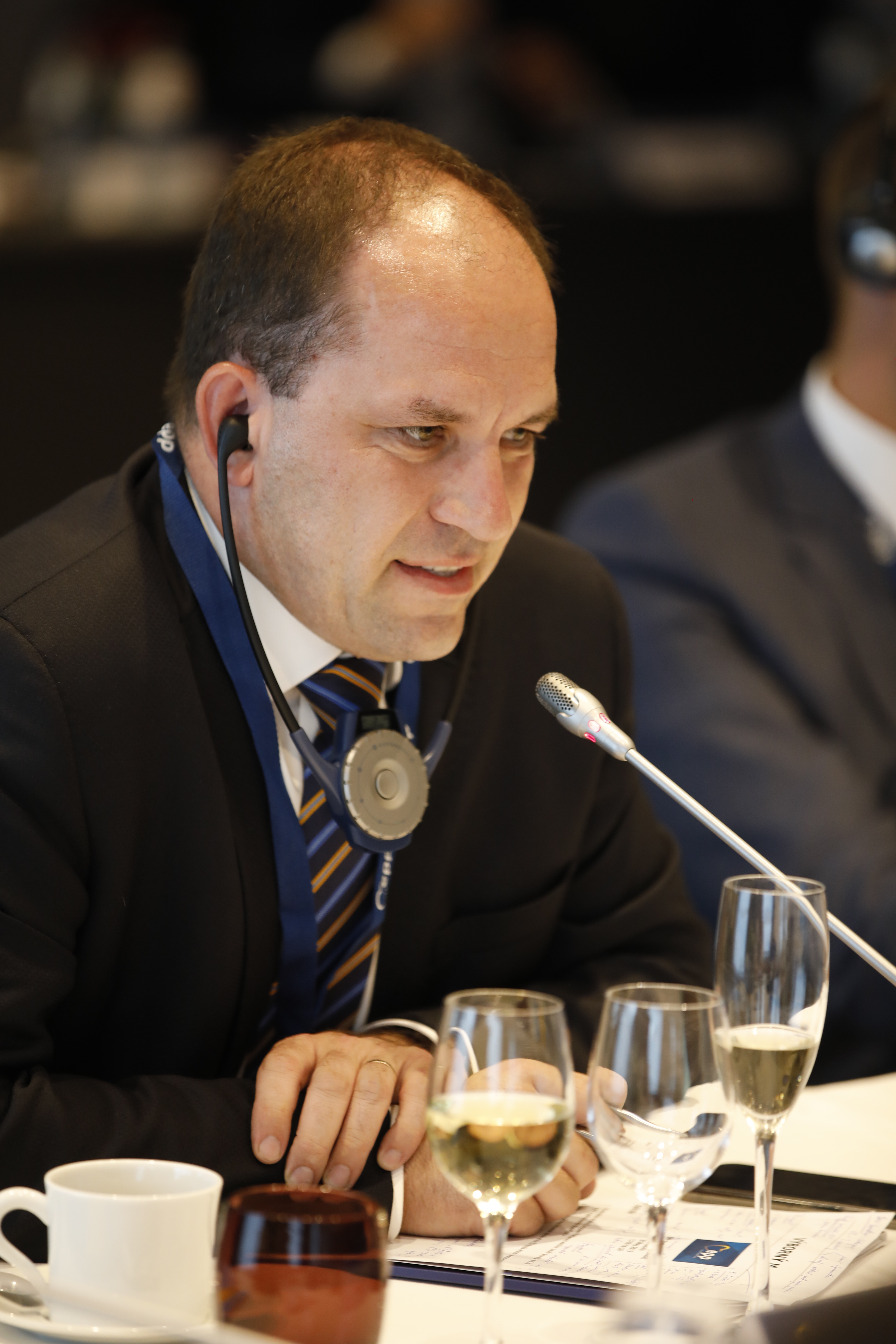 EPP Summit, Brussels, May 2019